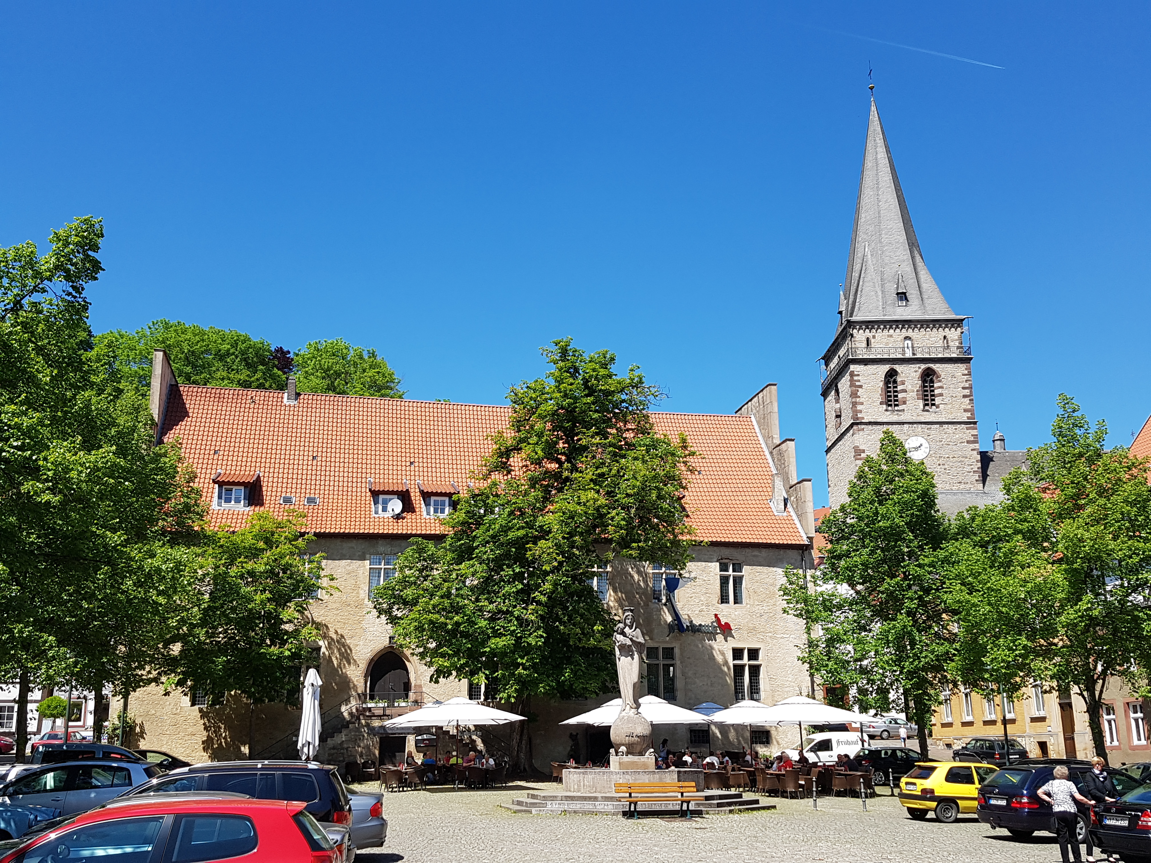 Altstadtmarkt von Warburg mit ehem. Rathaus der Altstadt und Kirche Mariä Heimsuchung